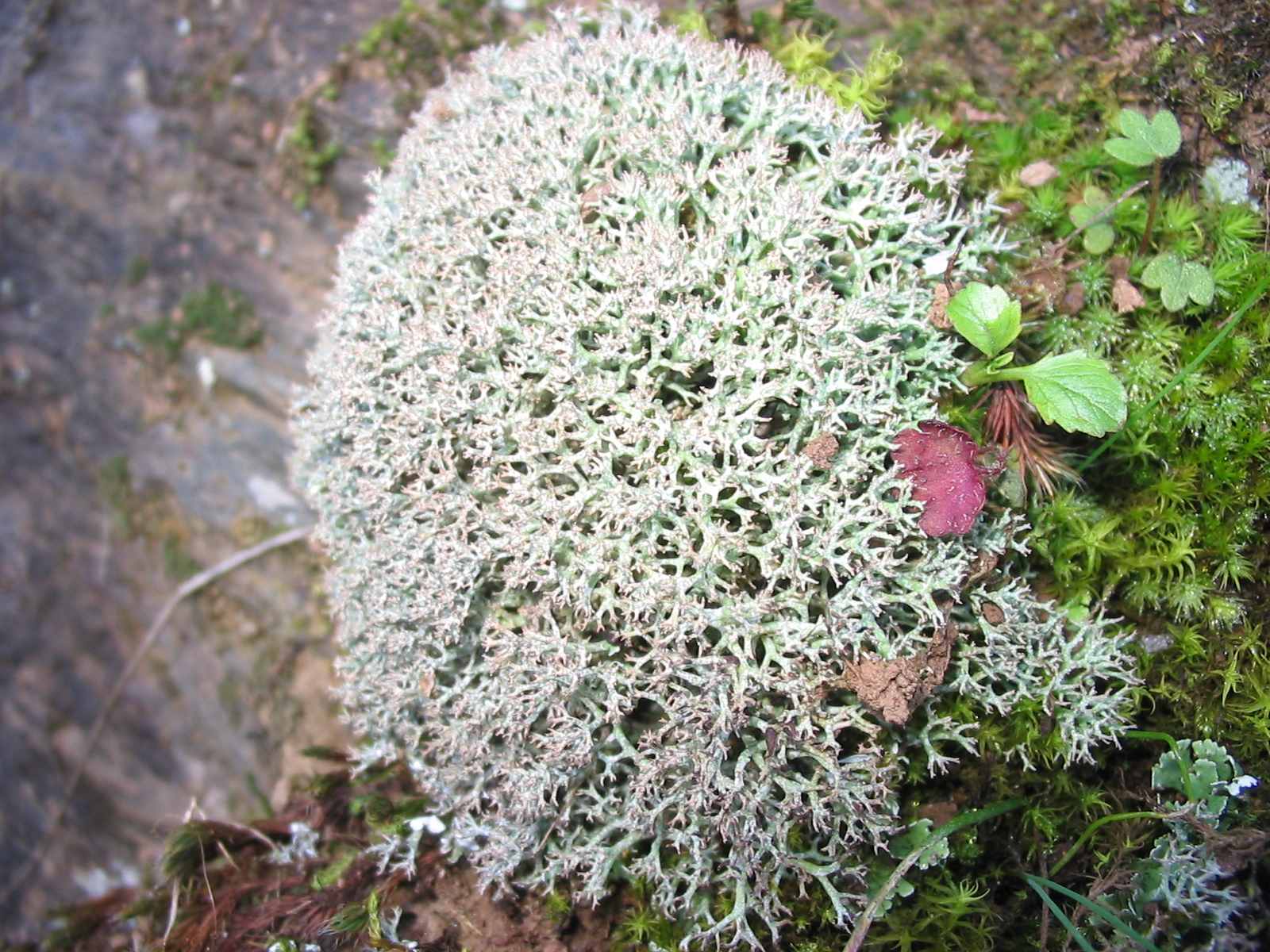 Fotografía realizada por Pablo Alberto Salguero Quiles a un ejemplar de 8 cm. de tamaño. La fotografía está realizada en el Parque Nacional de Monfragüe ESPAÑA. En Marzo del 2007.